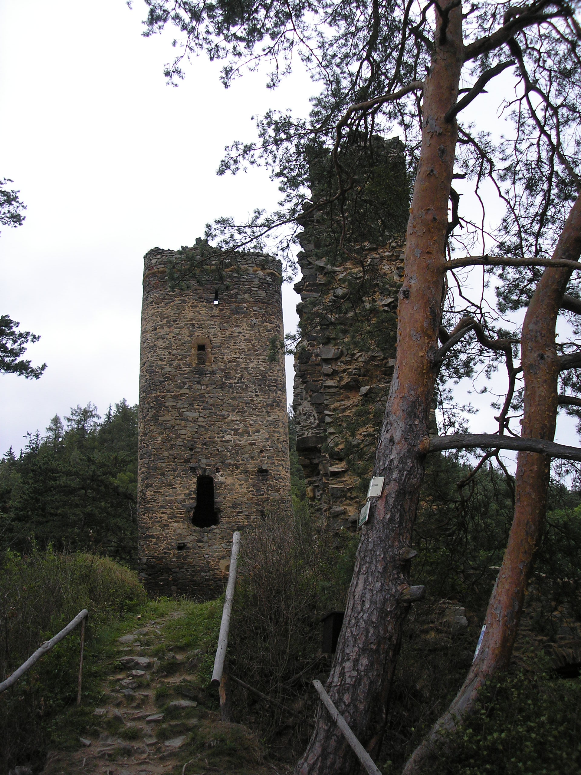 Libstejn